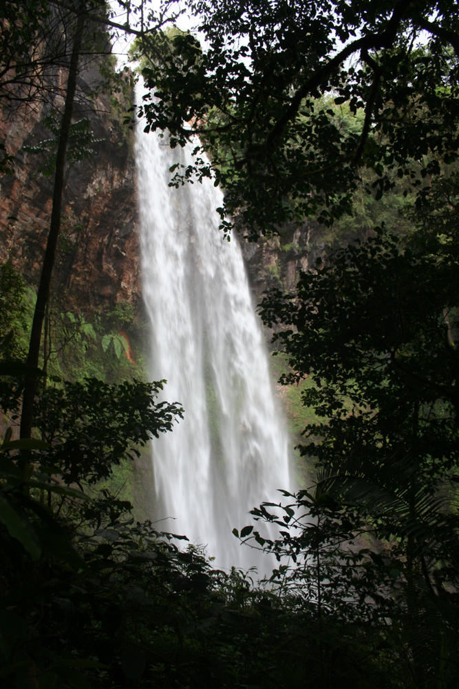 Chute Mamy wata à Fongo-Tongo dans la menoua (Ouest-Cameroun)